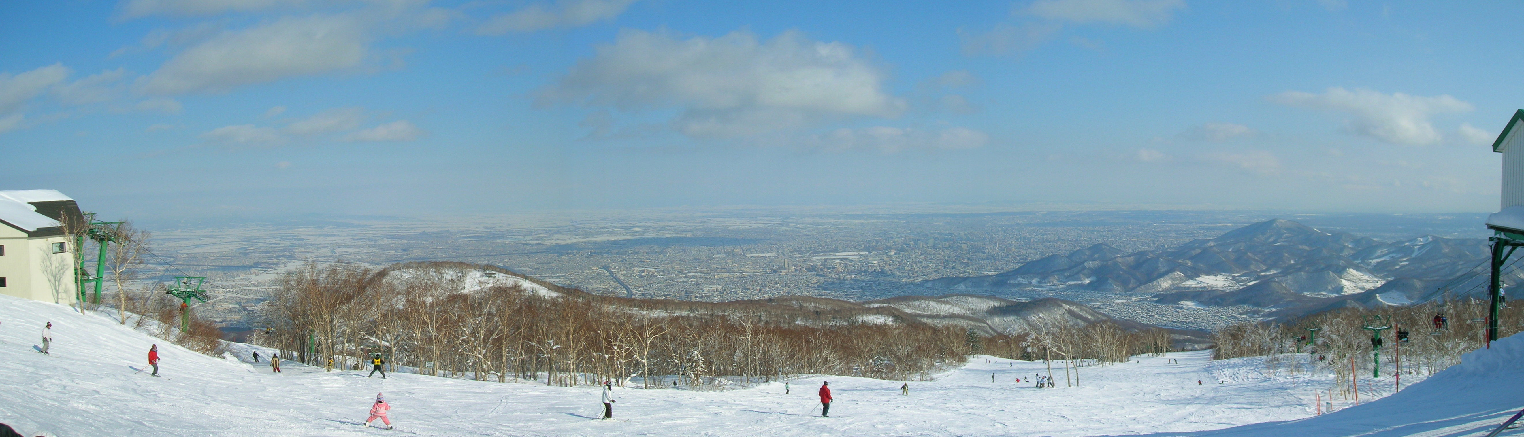 手稲山 Mt.Teine